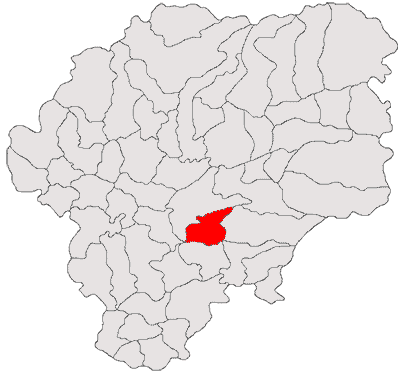 Categorie:Hărţi ale judeţului Bistriţa-Năsăud